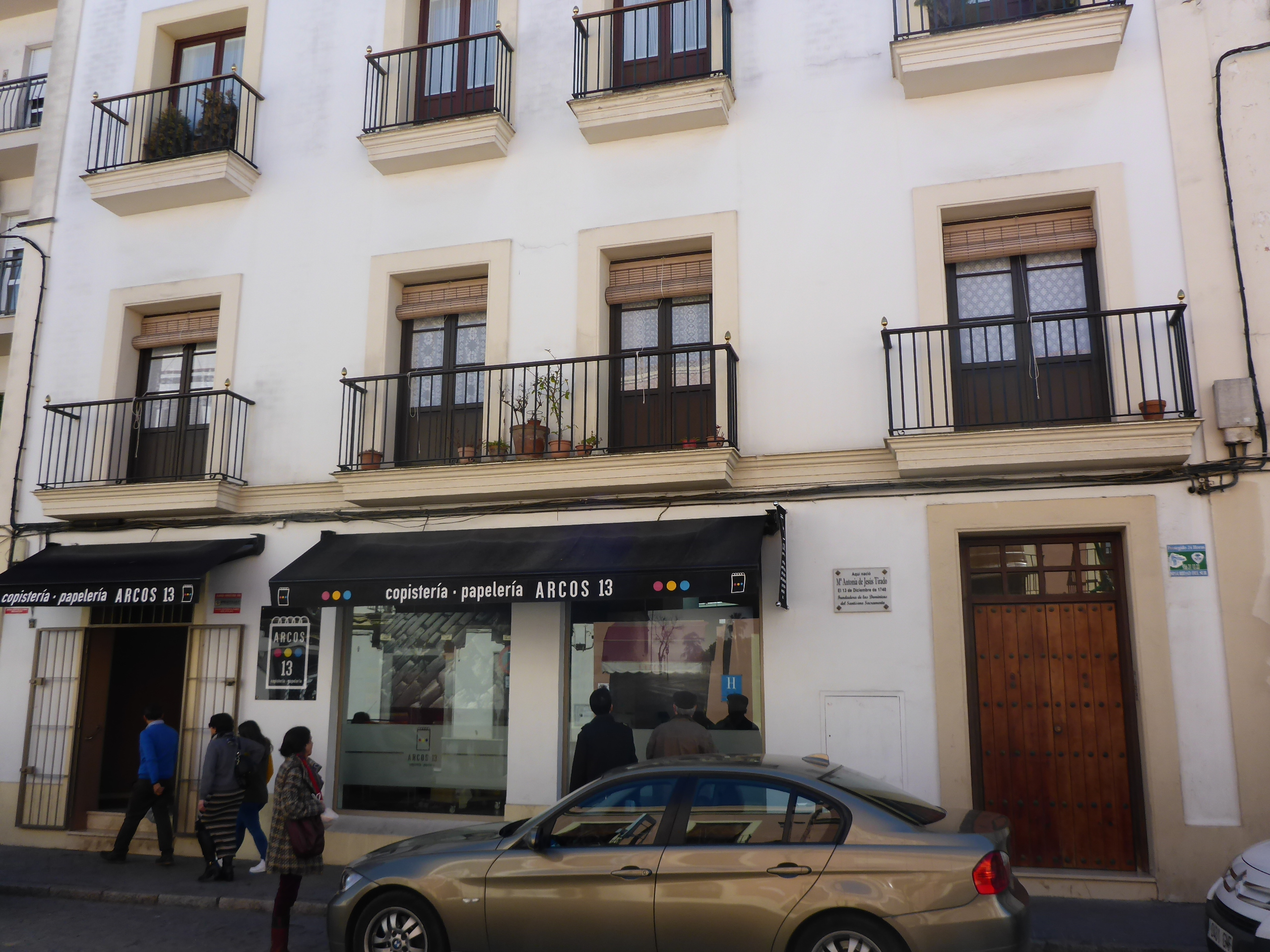 Casa donde nació Maria Antonia de Jesus Tirado